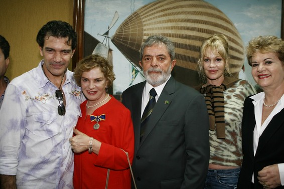 O ator Antonio Banderas, a primeira-dama Marisa Letícia, o presidente Luiz Inácio Lula da Silva, a mulher de Banderas, Melanie Griffith, e a governadora do Rio Grande do Norte, Wilma de Faria, durante encontro em Natal, capital do Rio Grande do Norte, Brasil, em dezembro de 2007. The actor Antonio Banderas, first-lady Marisa Letícia, president Luiz Inácio Lula da Silva, the woman of Banderas, Melanie Griffith, and the governor of the Rio Grande do Norte, Wilma de Faria, during meeting in Natal, capital of the Rio Grande Norte, Brazil, in December of 2007.